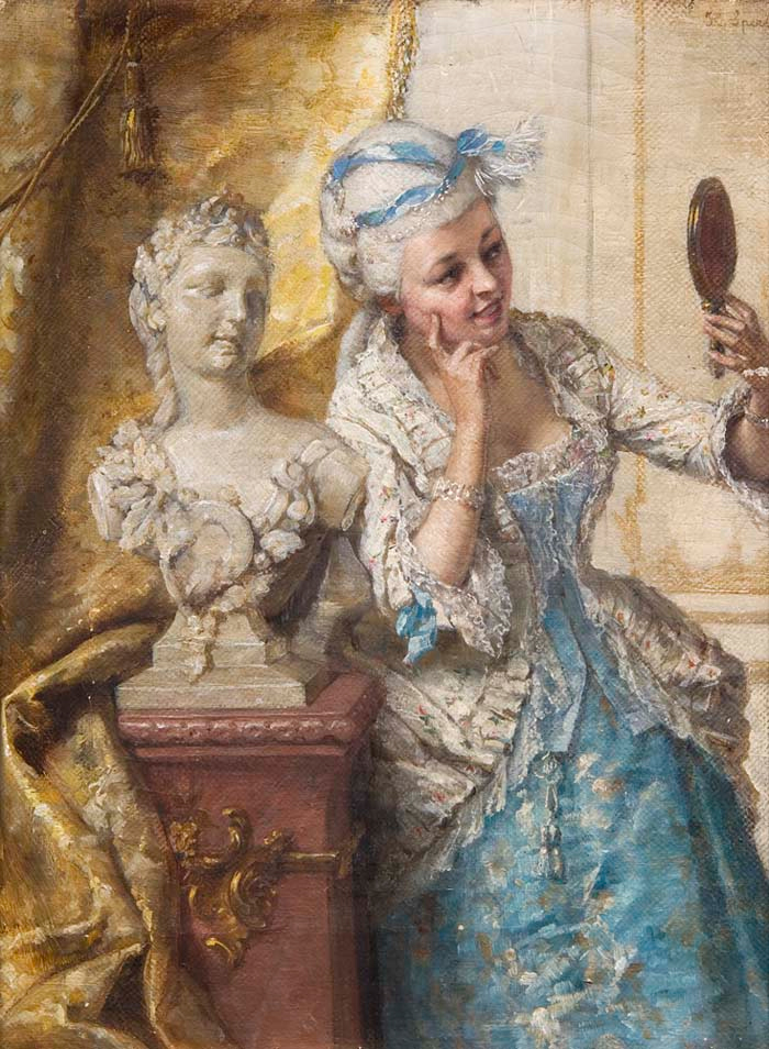 Rokoko-Dame mit Spiegel